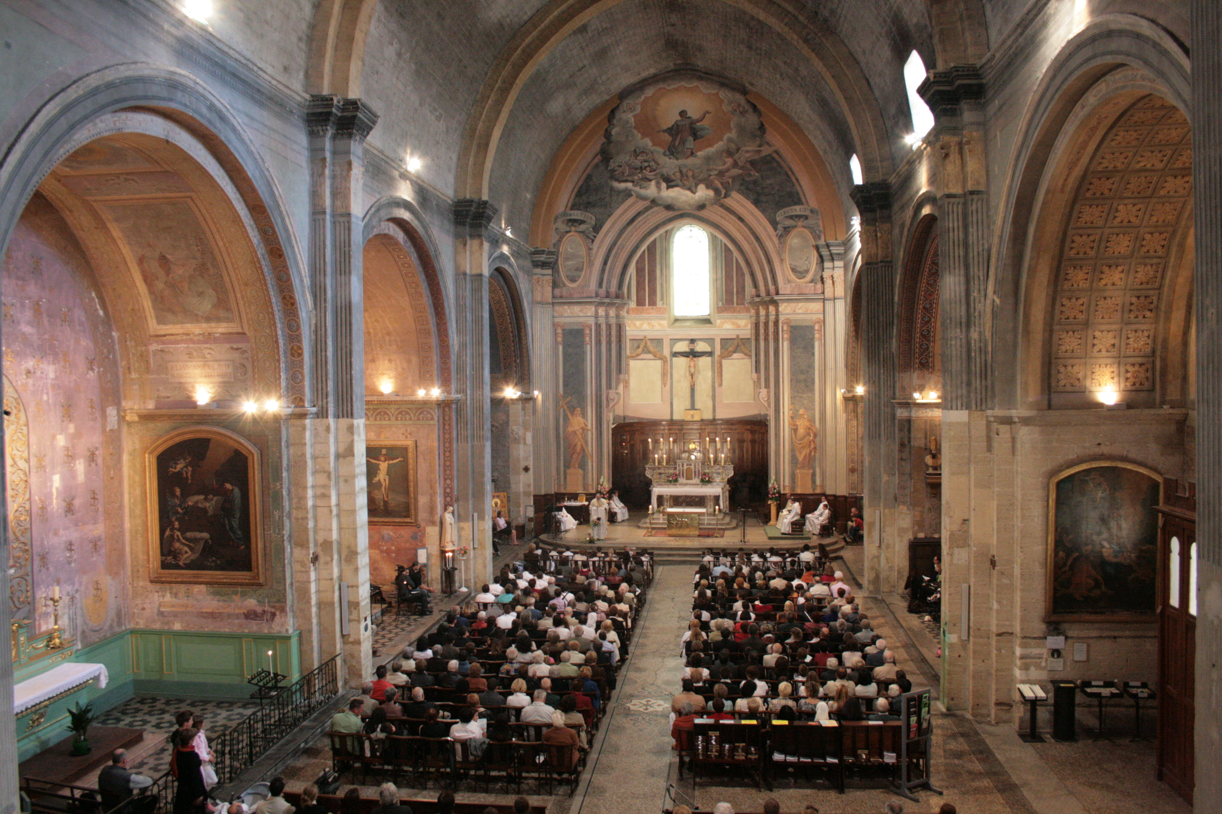 La cathédrale Notre Dame de Nazareth en 2008 a fêté ses 800 (consaans de consécration (consacrée le 26 octobre 1208).